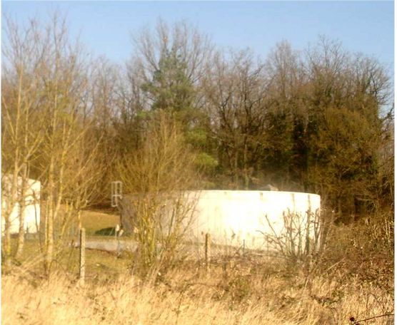 Usine de production d'eau potable du SIPTEC